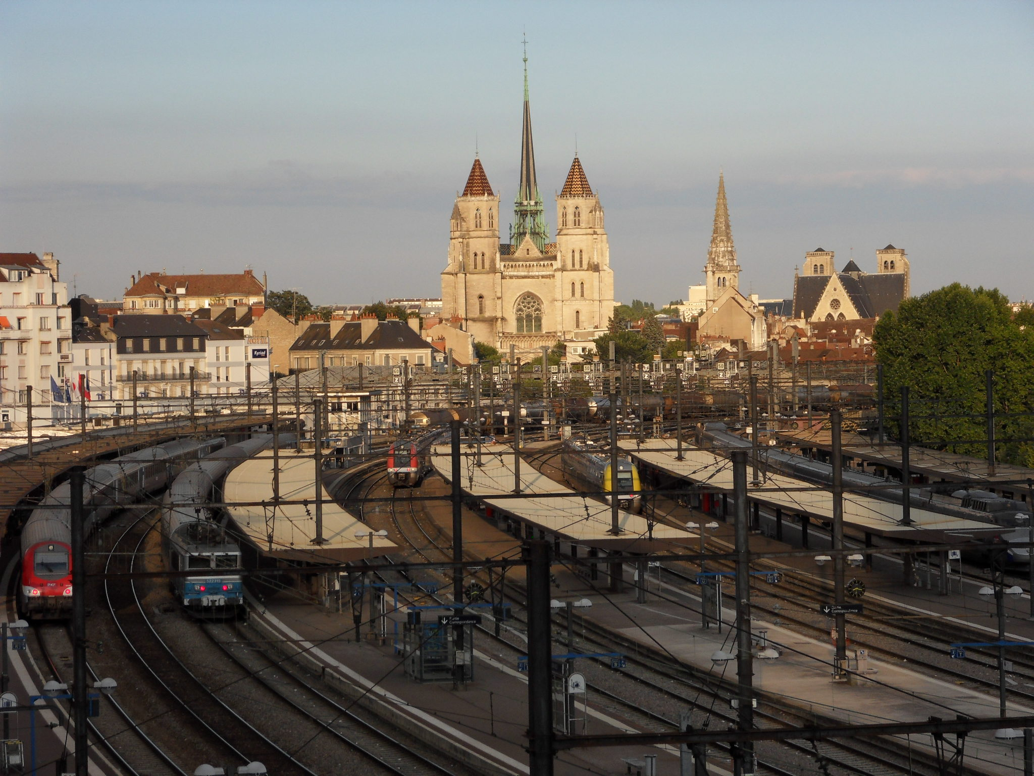 Gare de Dijon Ville. Ligne classique Paris - Marseille. Vue sur les voies de la gare. La cathédrale Saint-Bénigne.